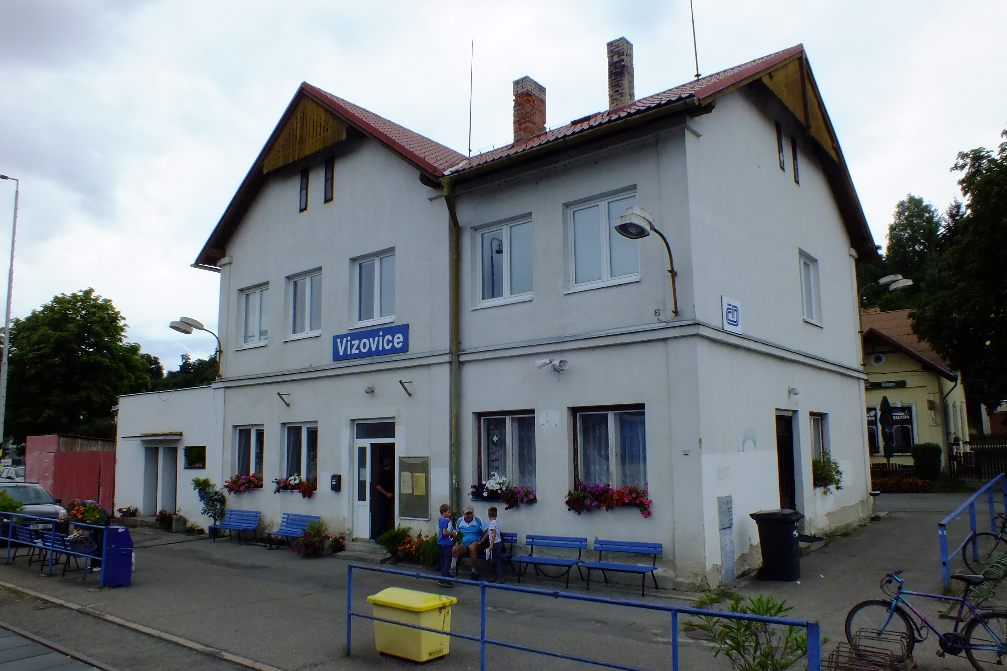 Staniční budova